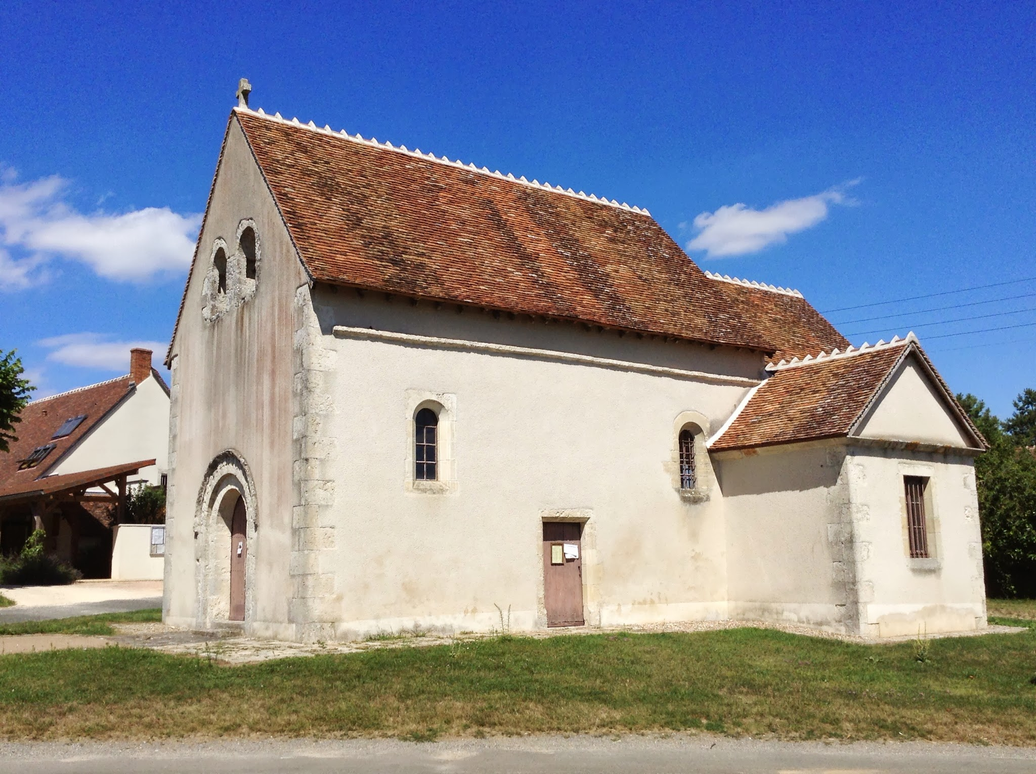 Chavannes (Cher)